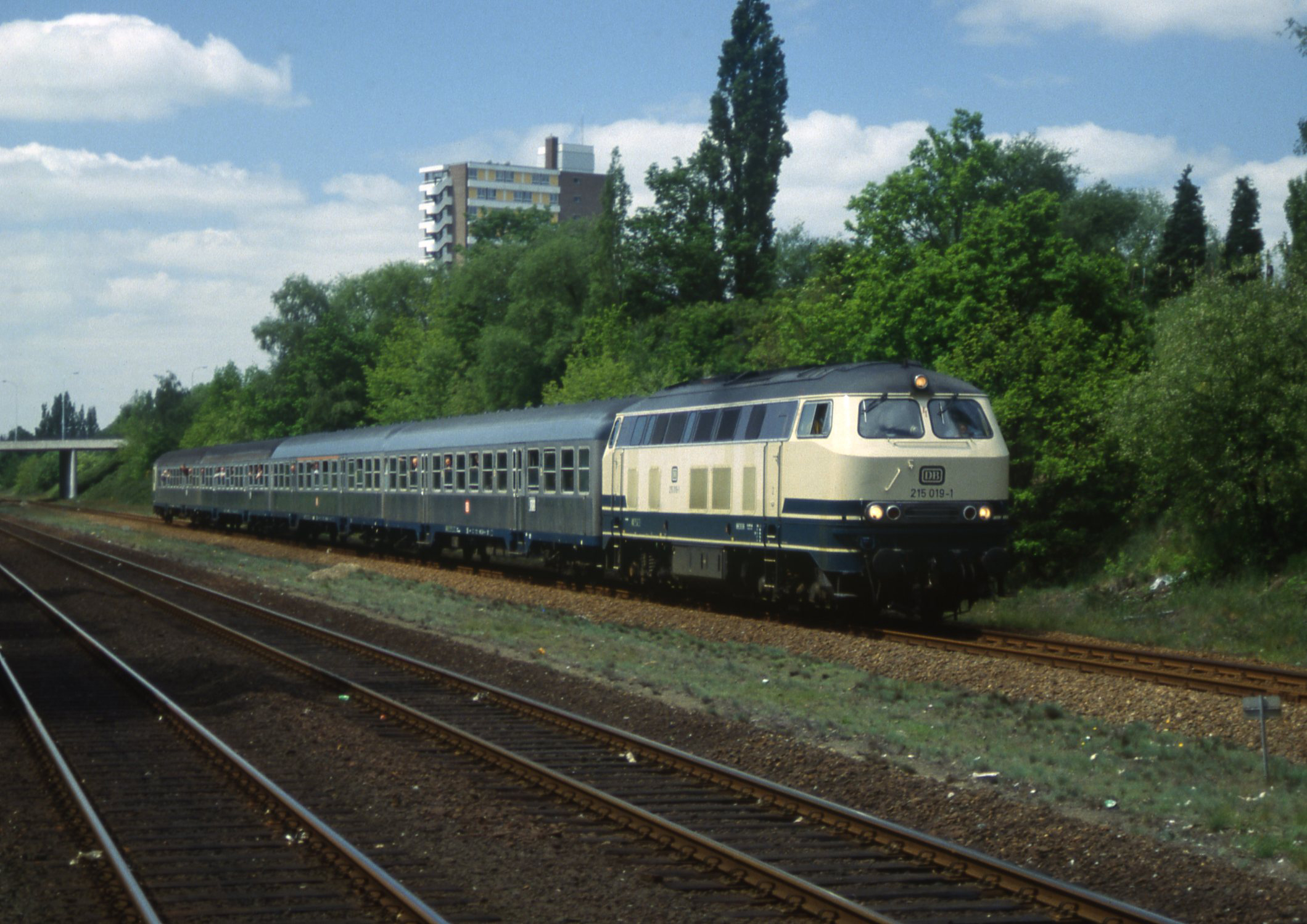 De Duitse trein (nr 3785) naar Kleef op 1 juni 1991 voor de opheffing.